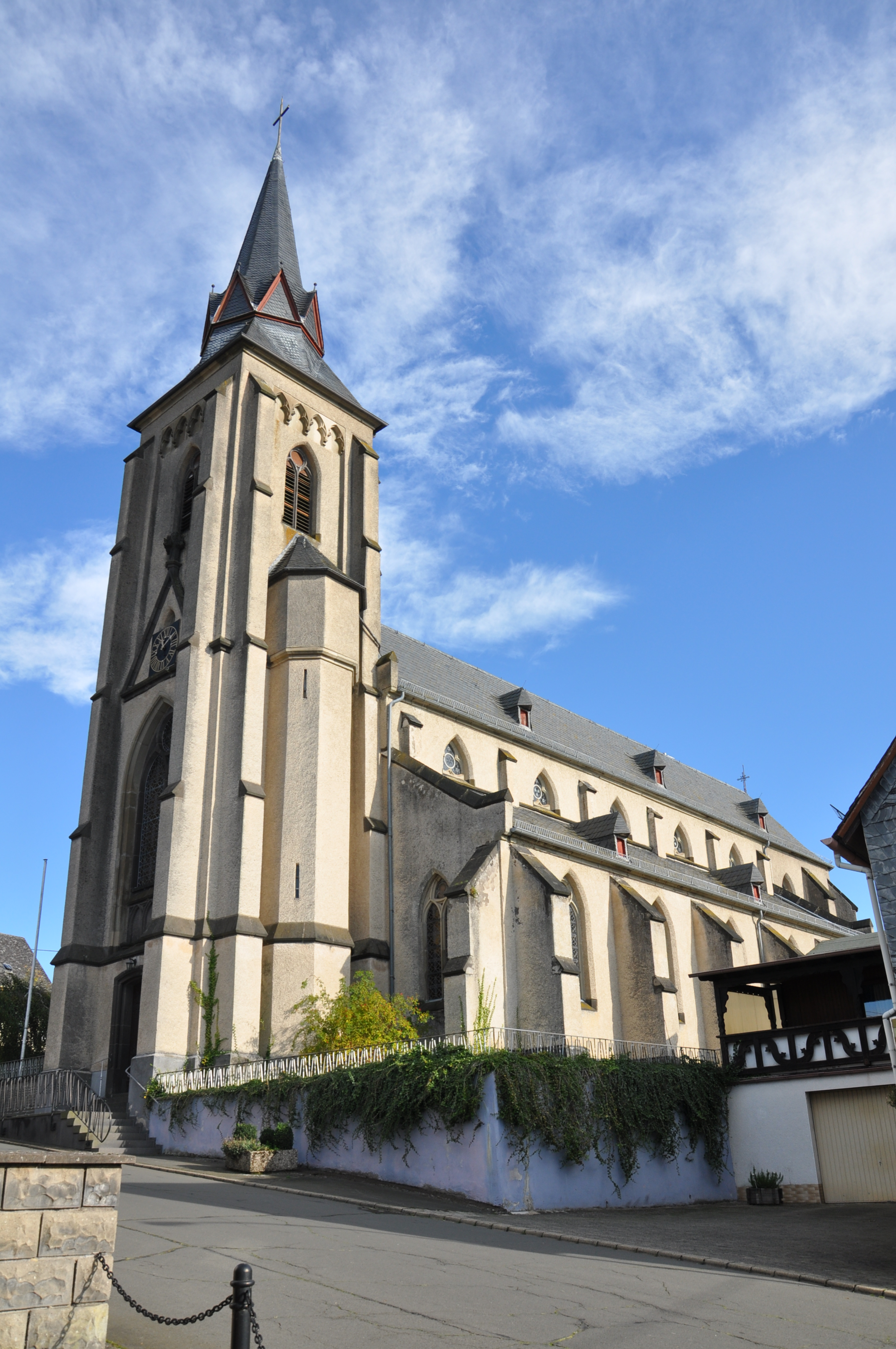 Müllenbach (Landkreis Cochem-Zell), St. Hubertus